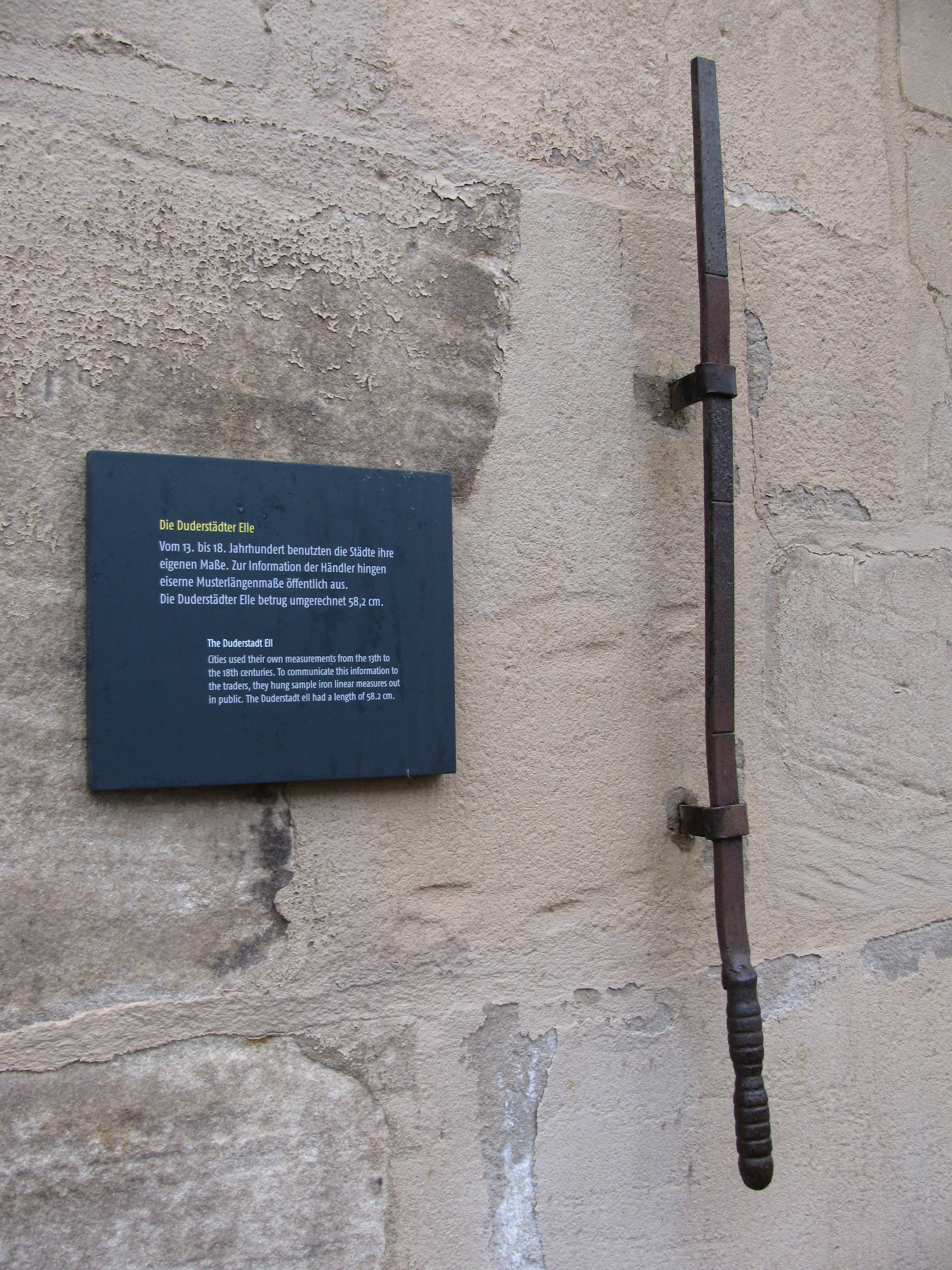 Duderstadt, Niedersachsen, Deutschland. Eine am Rathaus öffentlich angebrachte Duderstädter Elle.